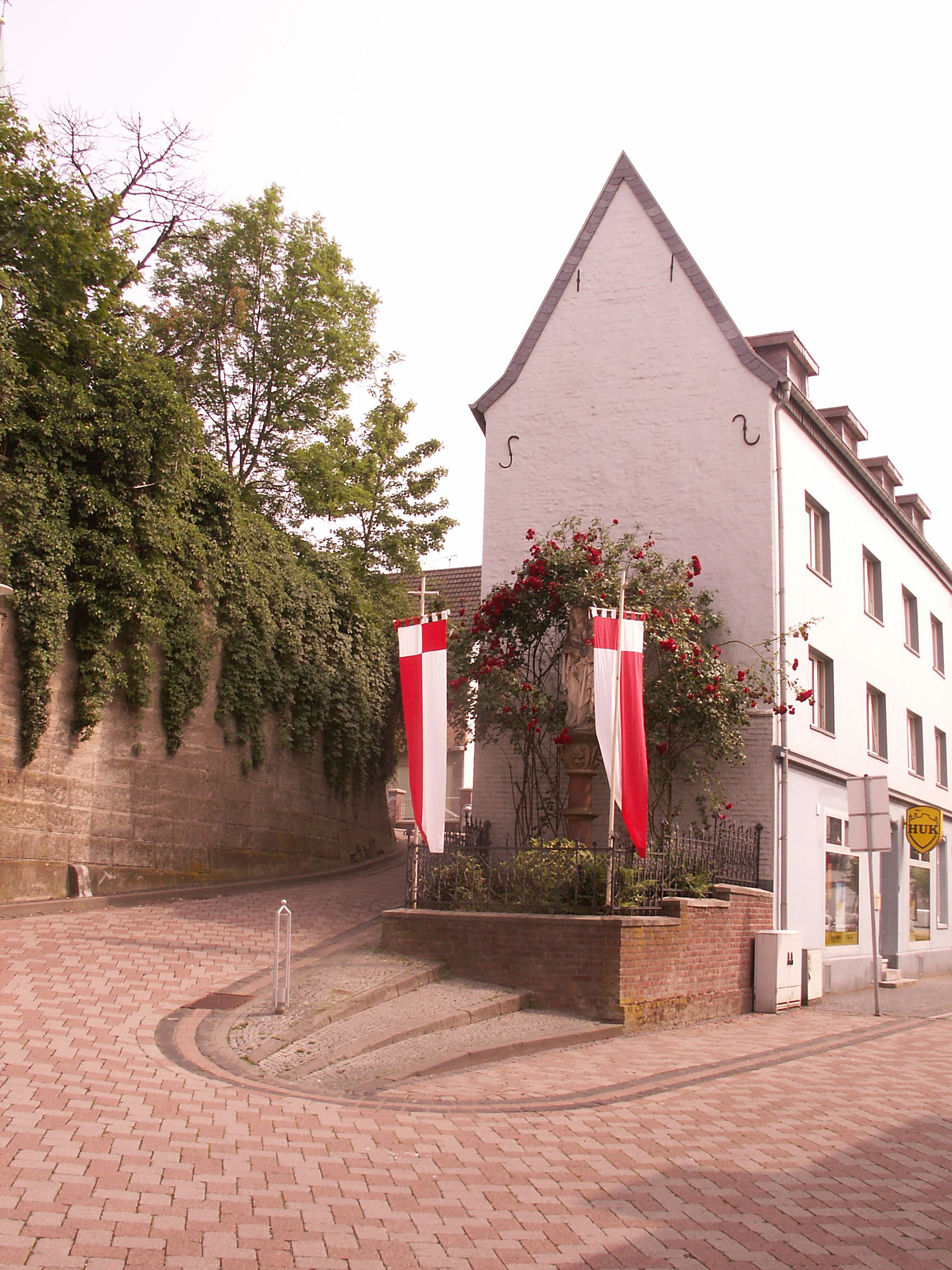 Heinsberger Land, Heinsberg Stadt, links die Auffahrt zum Burgberg mit dem Selfkantdom der Stadt